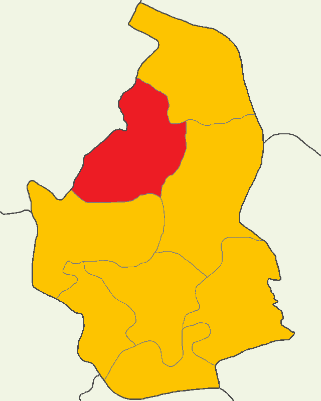 Nevşehir'de 2014 Türkiye cumhurbaşkanlığı seçimi sonuçları